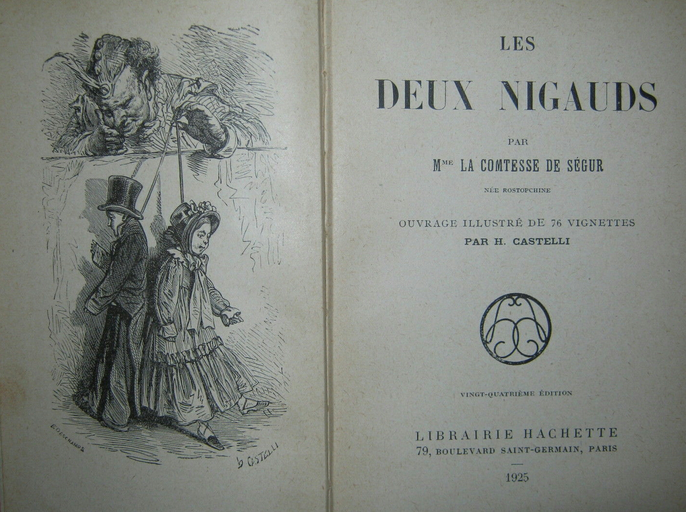 Comtesse de Ségur, Les Deux Nigauds, bibliothèque rose, illustrations Horace Castelli (1863, rééd. 1925).